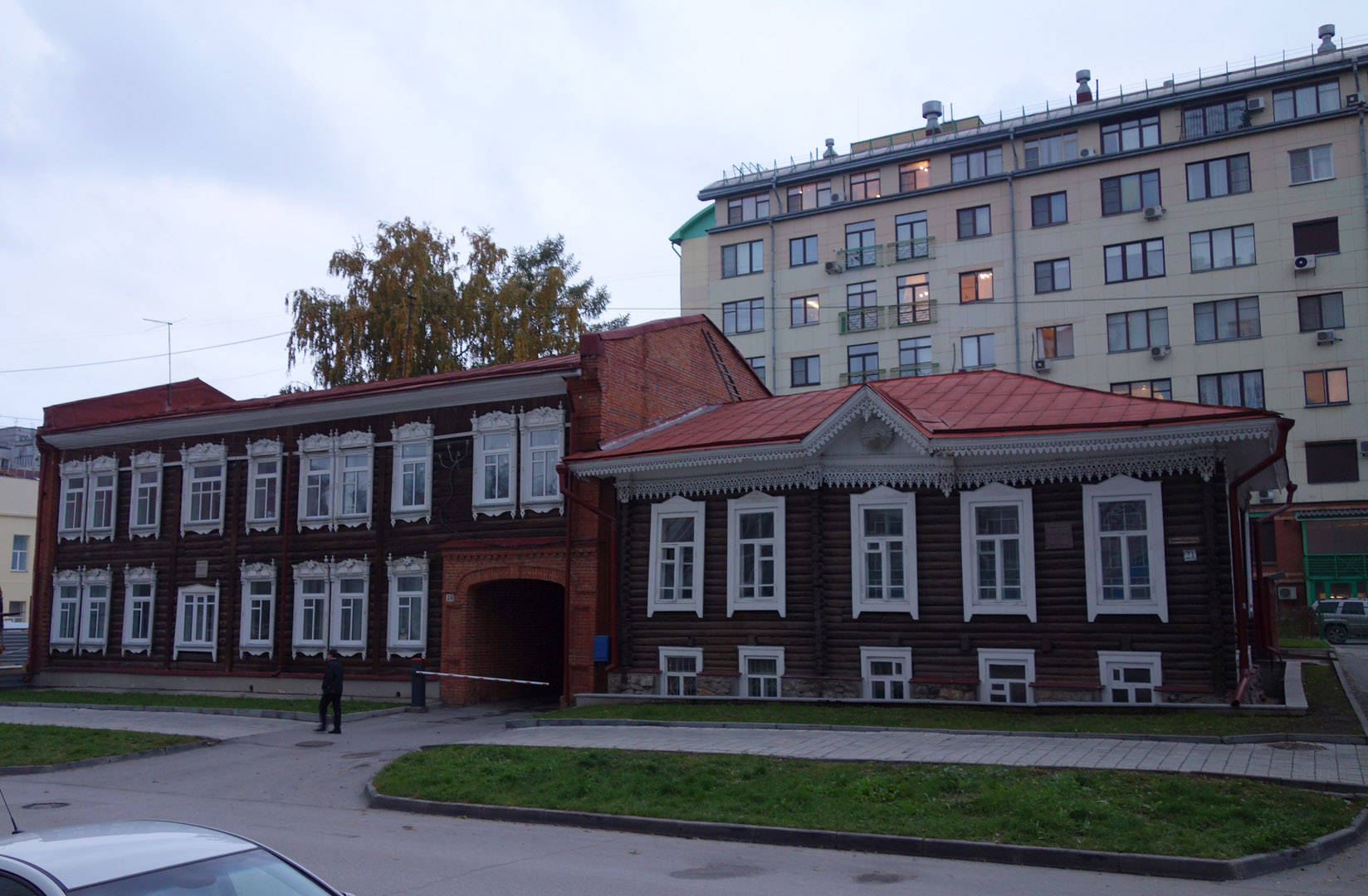 Жилые дома по улице Коммунистической № 19 и № 21 (Новосибирская область, Новосибирск).